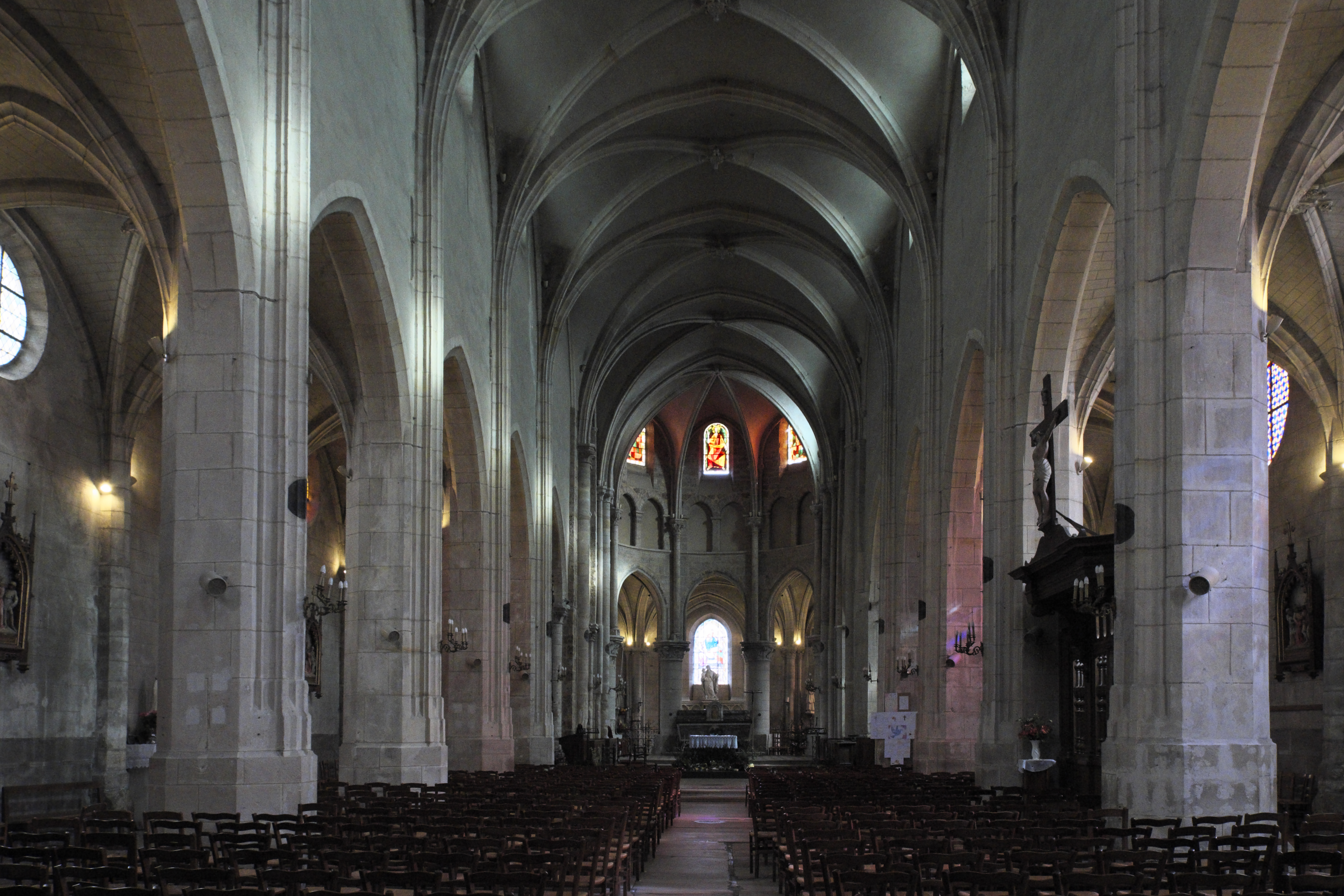 Katholische Pfarrkirche Saint-Clément in Arpajon im Département Essonne (Île-de-France/Frankreich), Innenraum